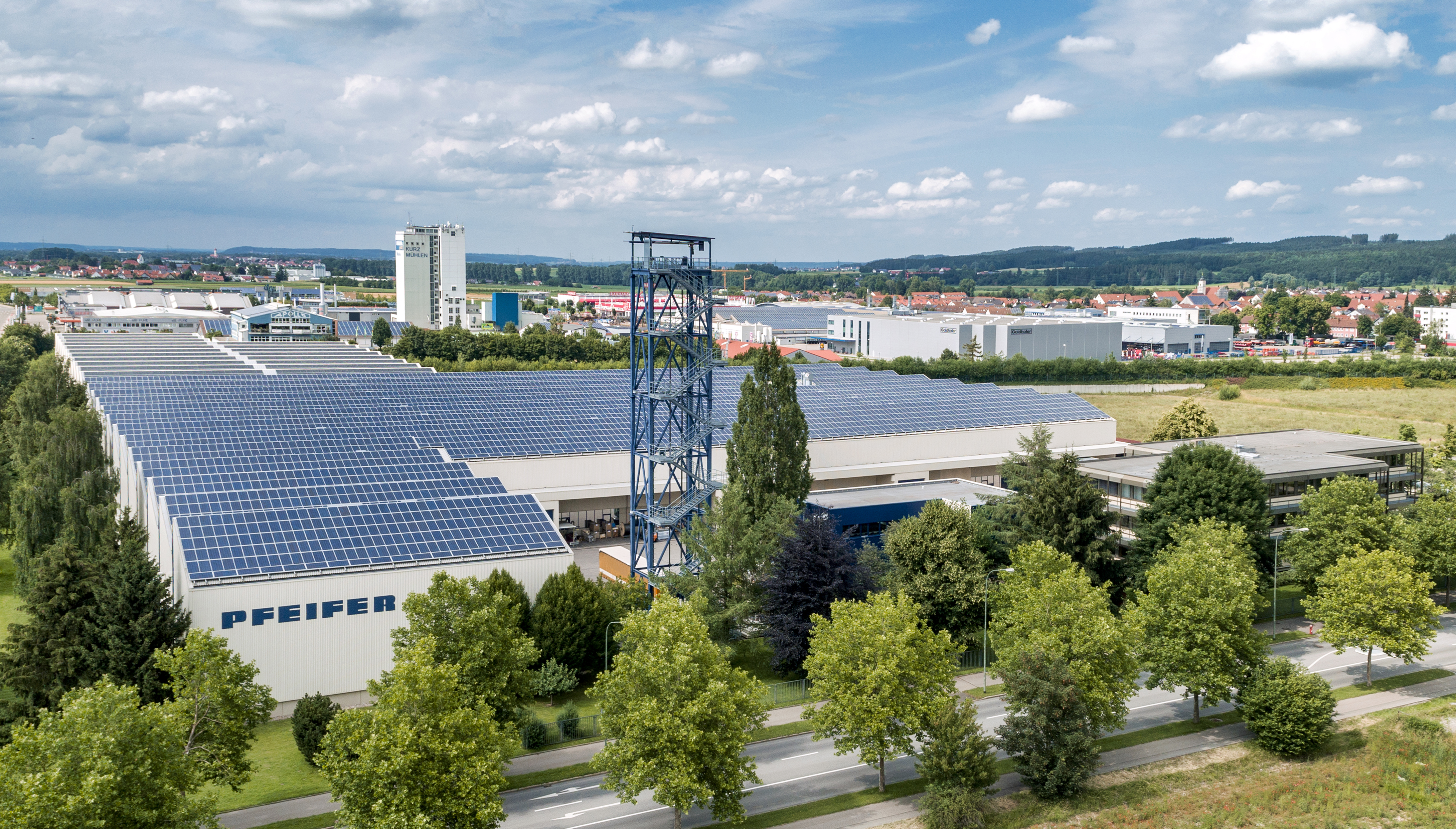 Verwaltungsgebäude, Prüfturm und Fertigungshalle der PFEIFER Holding GmbH & Co. KG in Memmingen